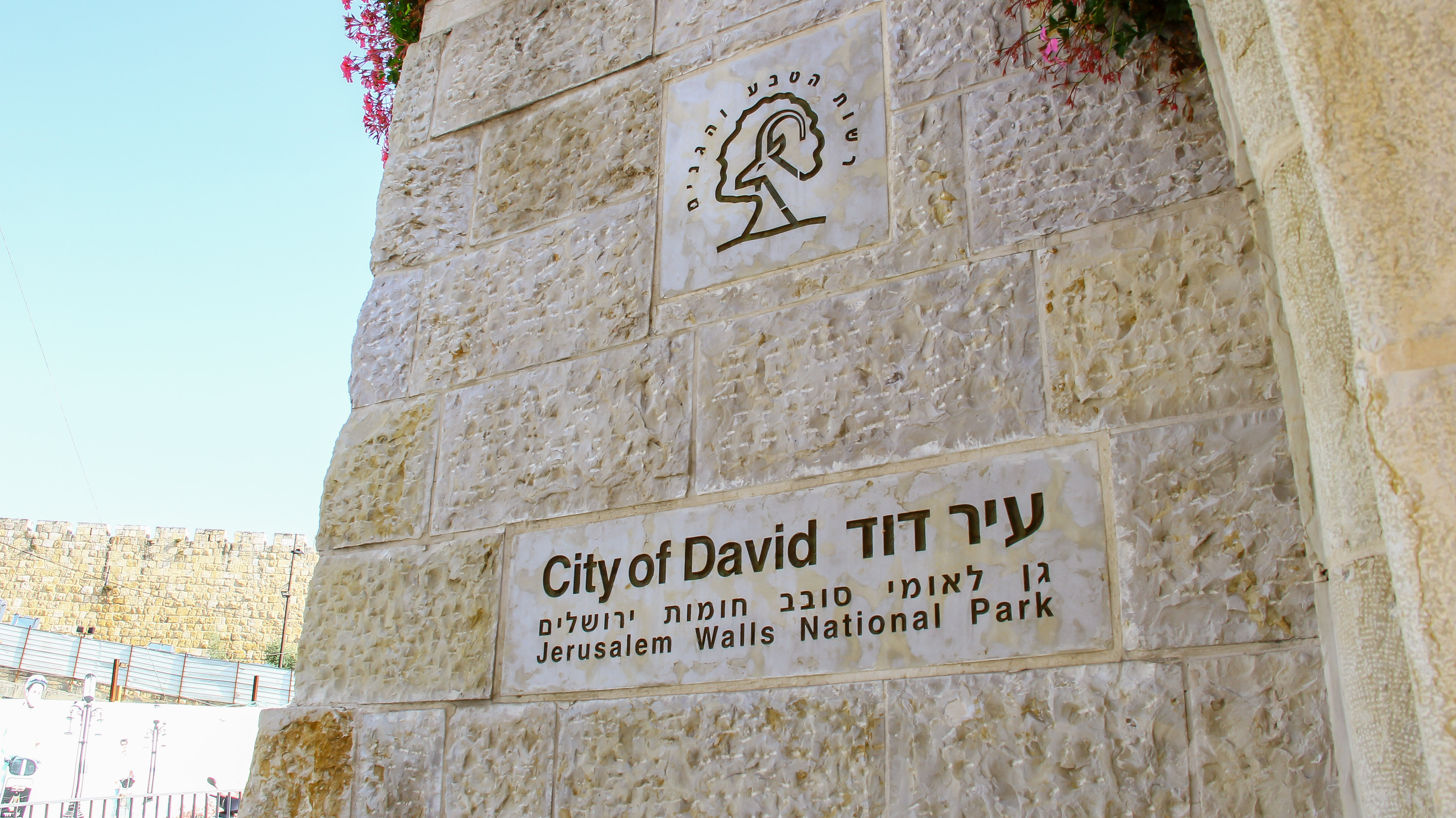 עיר דוד היא אתר ארכאולוגי שבו שכנה ירושלים הקדומה החל מראשית ימיה, בתקופת הברונזה התיכונה, והיא המשיכה להיות מיושבת עד לאמצע ימי הביניים.